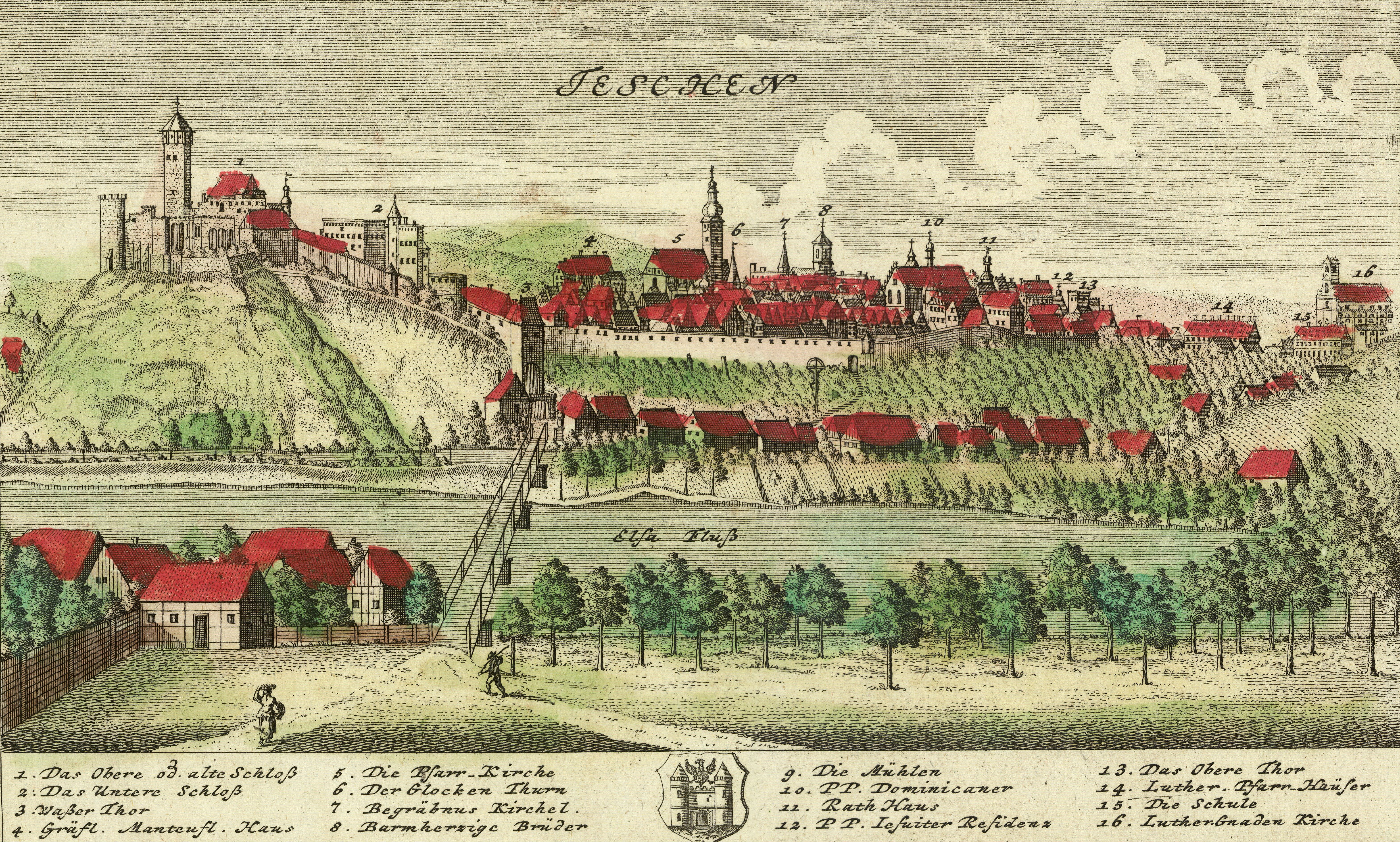 Těšín je město v jižním Polsku v okrese Cieszyn.